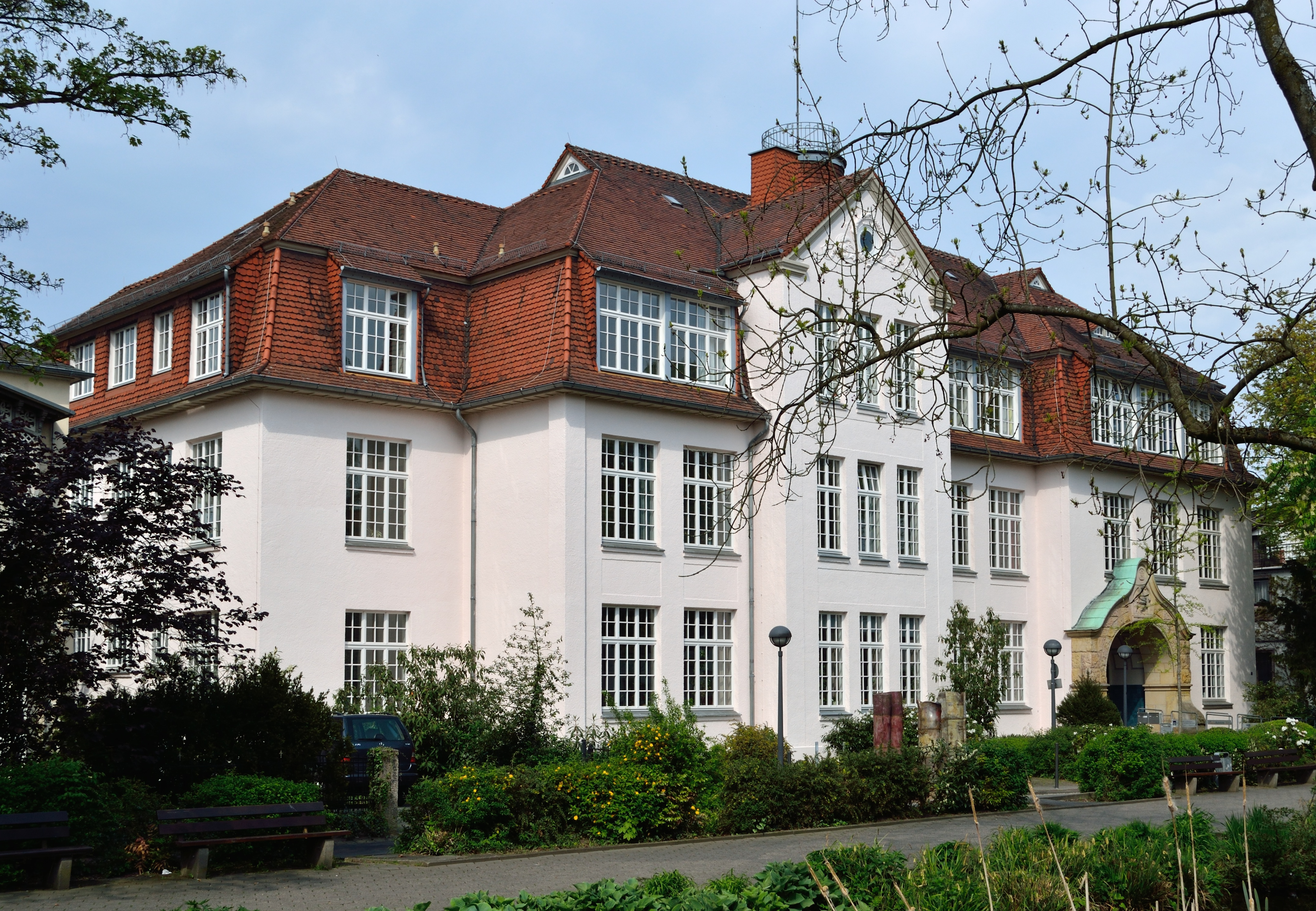 Baudenkmal Detmold Nr. 167 - altes Schulgebäude (heutiges Standesamt) Wall 5